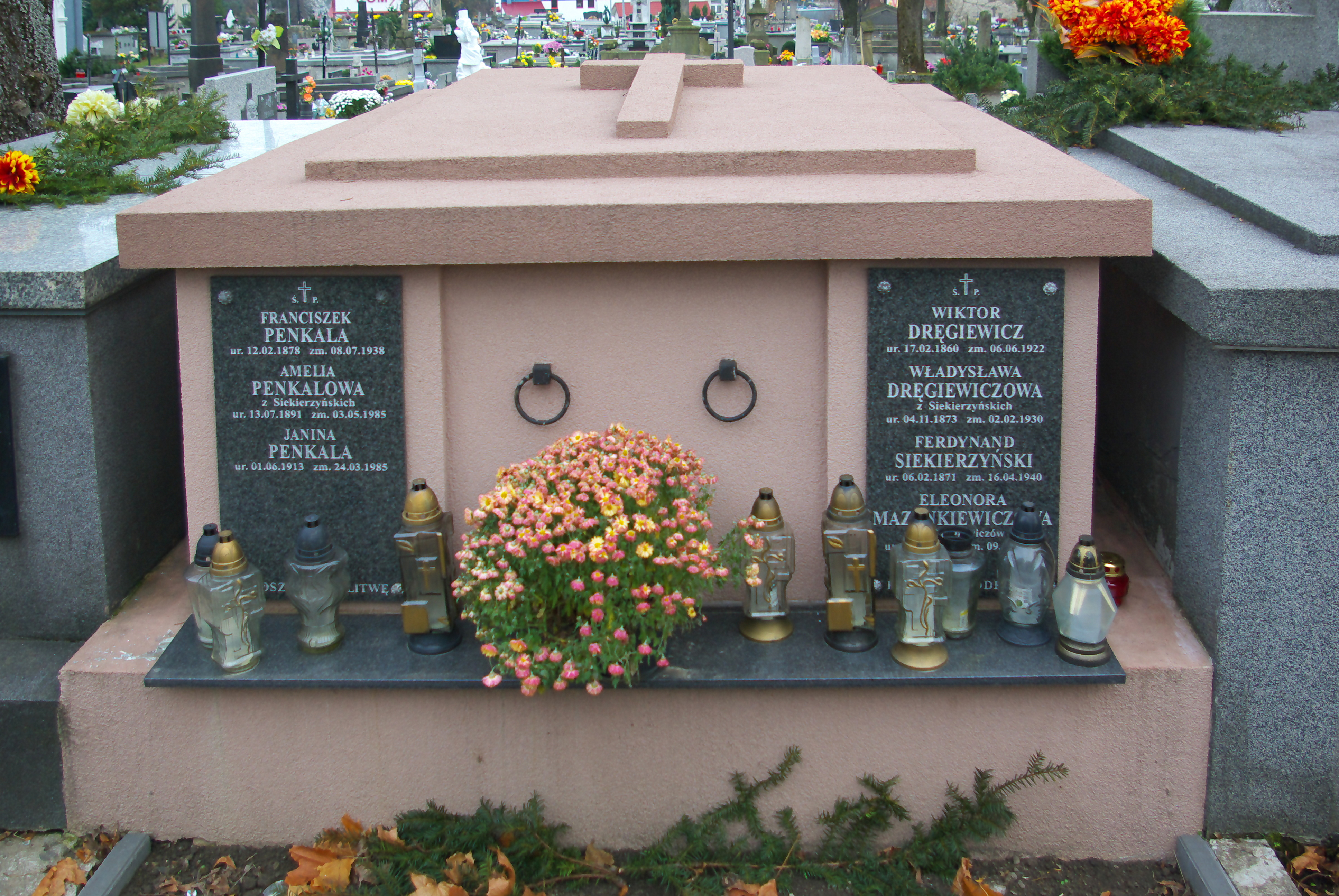 Grobowiec rodzin Dręgiewicz i Penkala na Cmentarzu Centralnym w Sanoku.